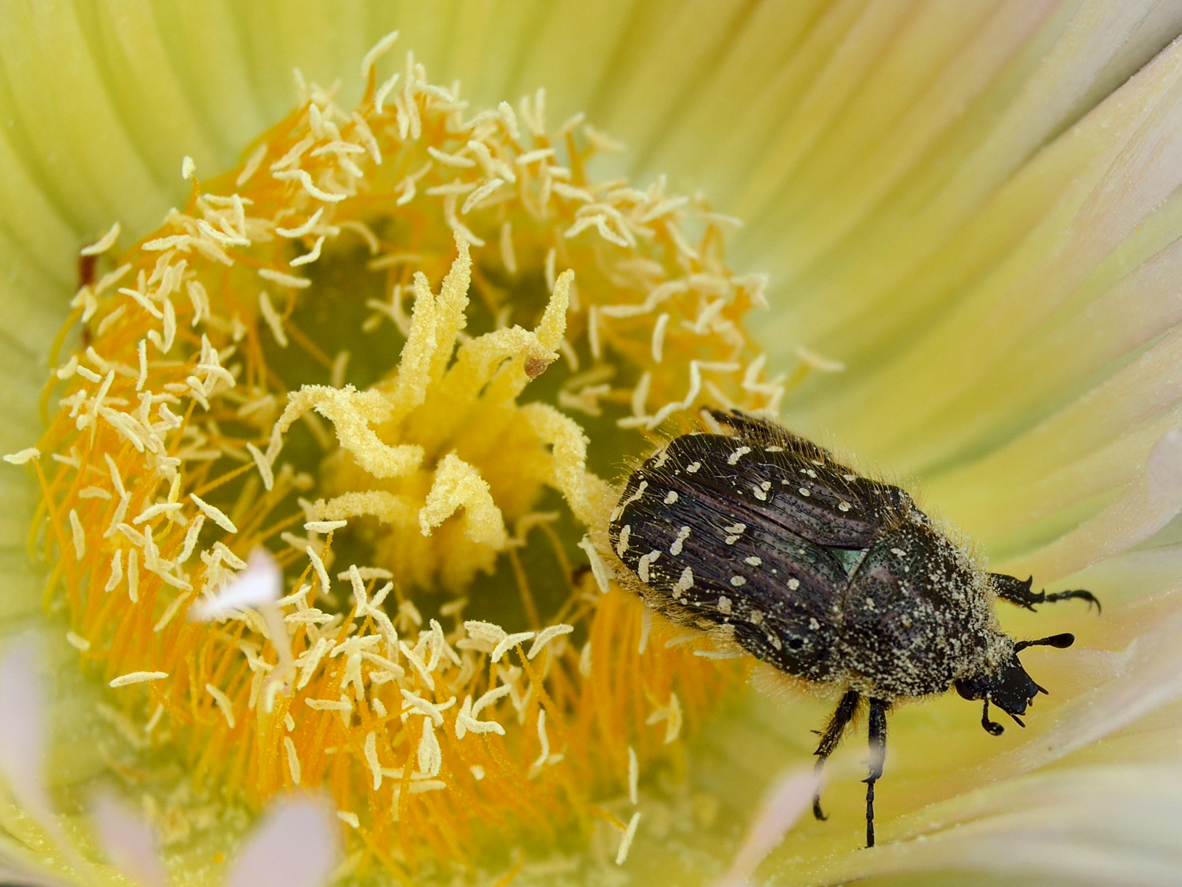 Escarabello voador da praia de Doniños, en Ferrol